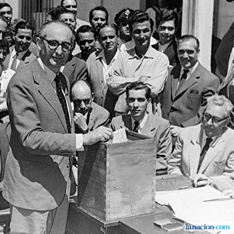 Arturo Frondizi votando para las elecciones presidenciales de 1958, Buenos Aires, Argentina.